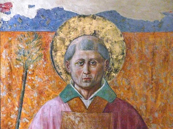 Convento di San Fortunato (Montefalco), Fresco of San Fortunato